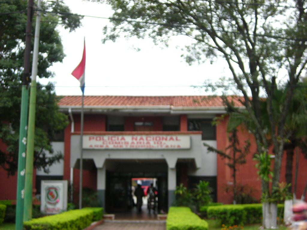 comisaria